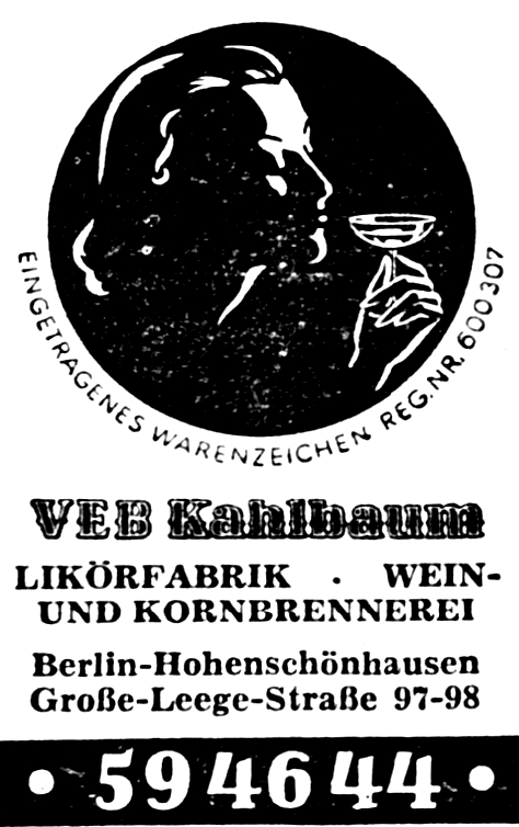 Gebäudeensemble der Kahlbaum-Sprit- und Likörfabrik